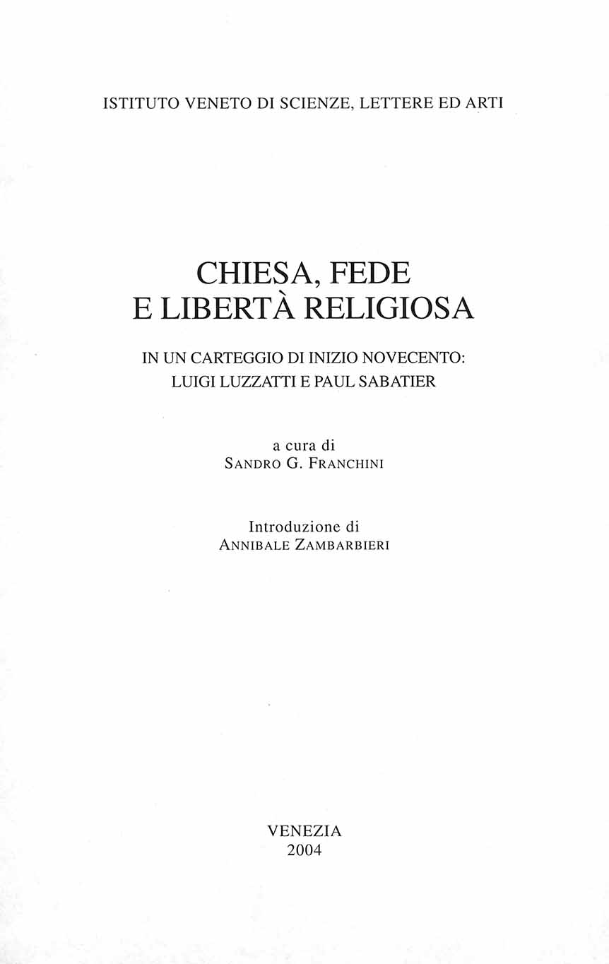 Chiesa, fede e libertà religiosa in un carteggio di inizio novecento : Luigi Luzzatti e Paul Sabatier / a cura di Sandro G. Franchini ; introduzione di Annibale Zambarbieri. - Venezia : Istituto veneto di scienze lettere ed arti, 2004. - LIV, 164 p. ; 24 cm. - (Biblioteca luzzattiana ; 10) .